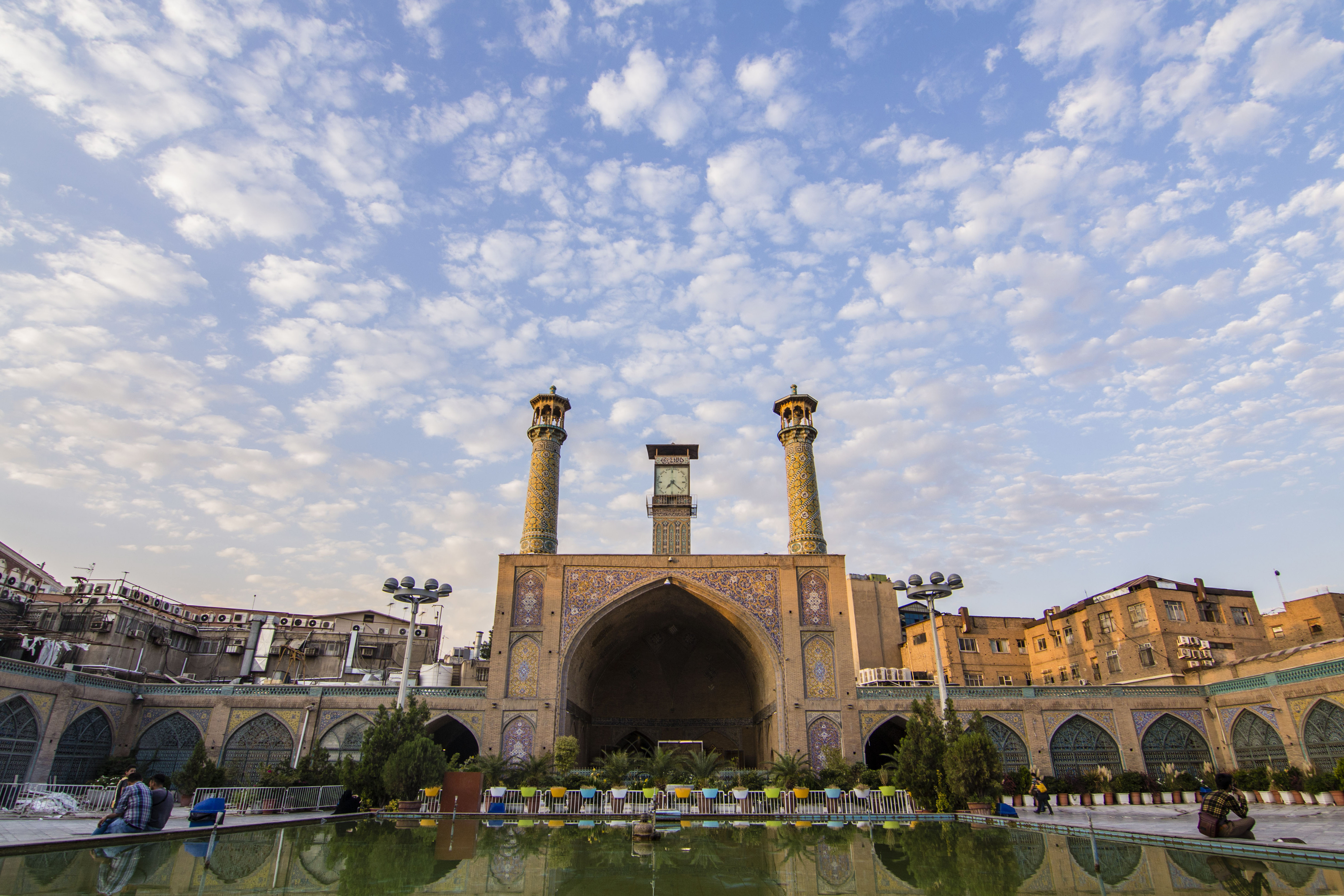 مسجد امام خمینی